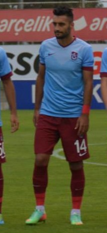 Mustafa Akbaş